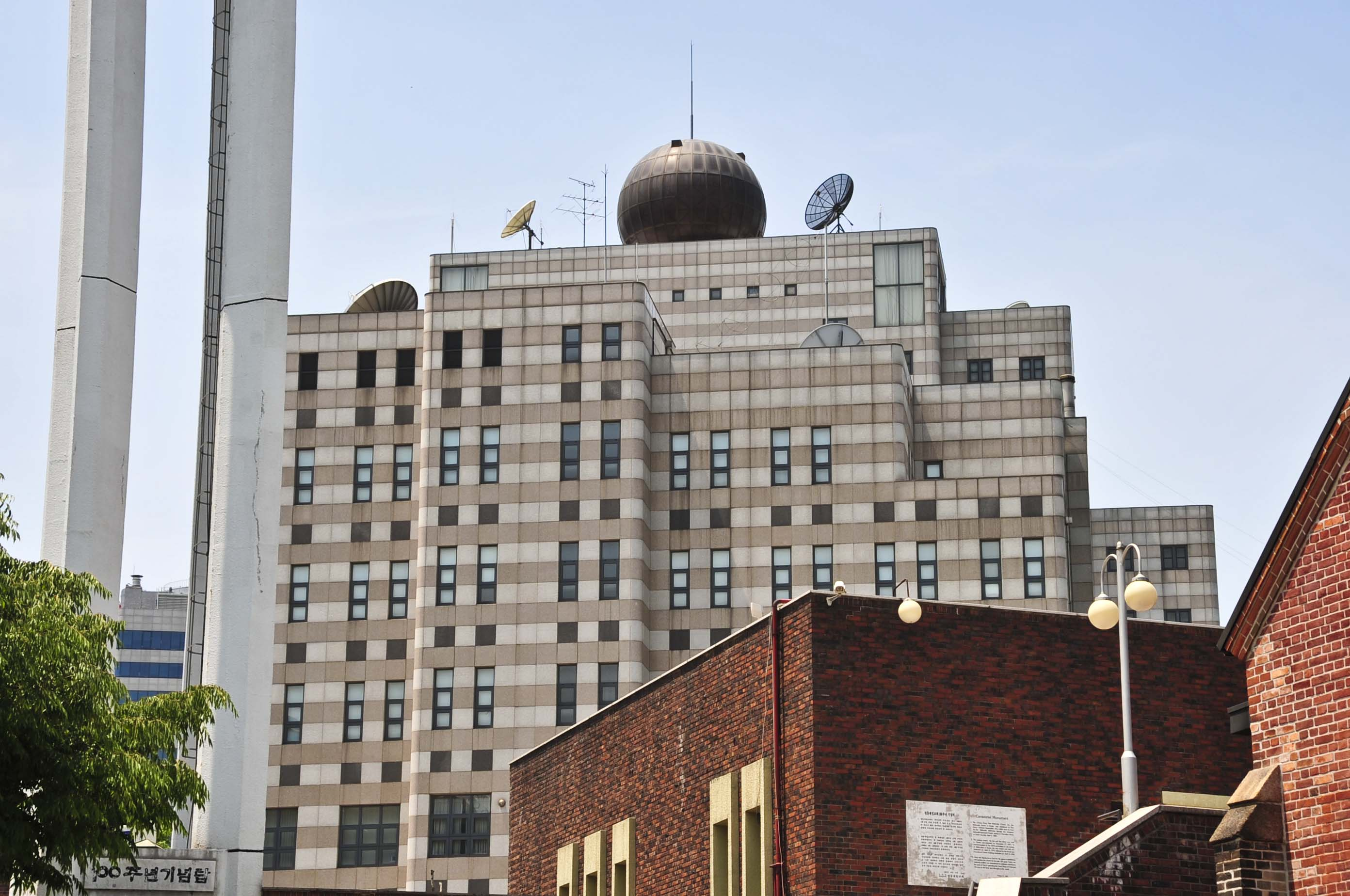 서울에 위치한 주한러시아대사관